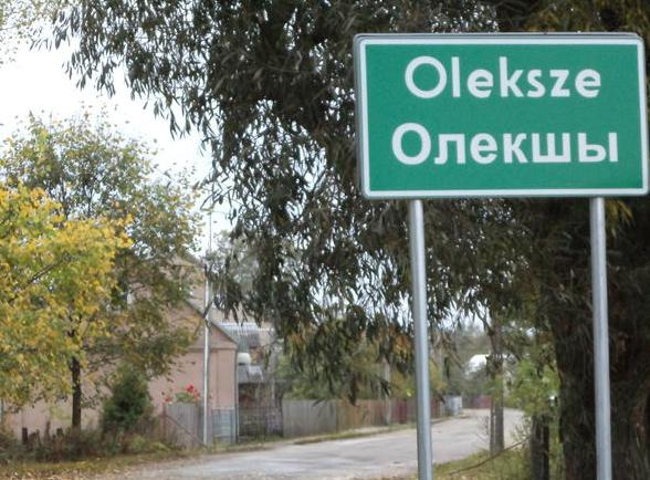 Dwujęzyczna tablica miejscowości (polski i białoruski)